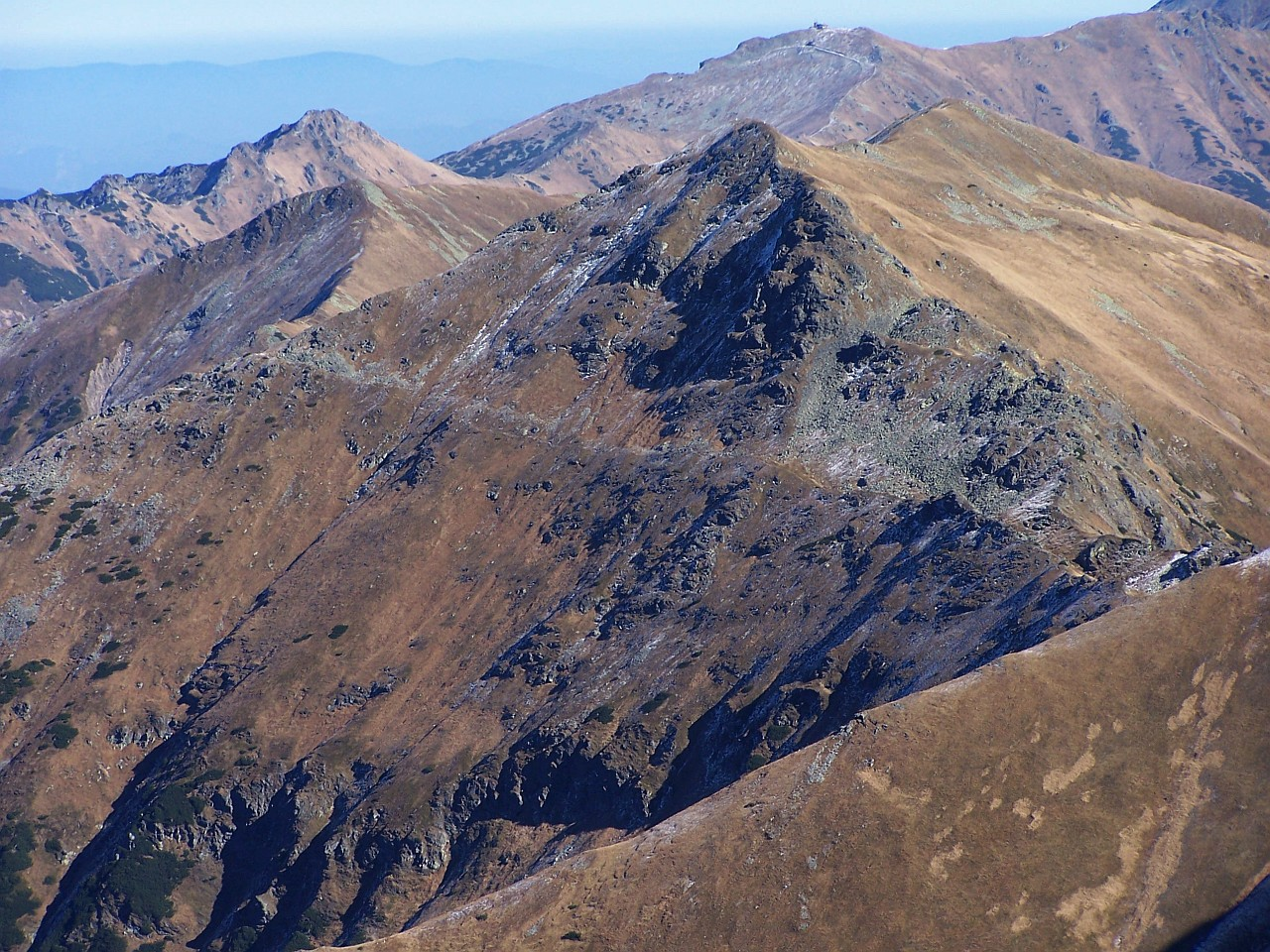 Smreczyński Wierch i inne